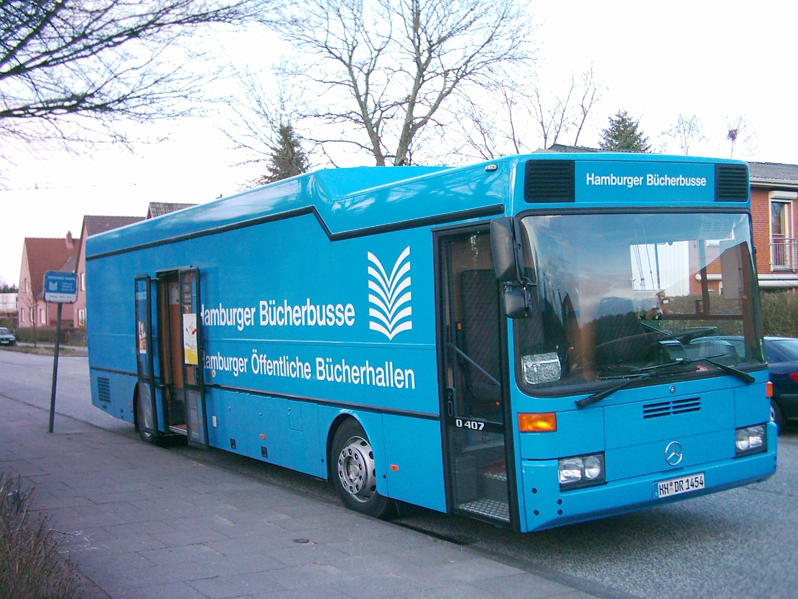 Bücherbus der Hamburger Öffentlichen Bücherhallen, Haltestelle Hausbrucher Bahnhofstraße.